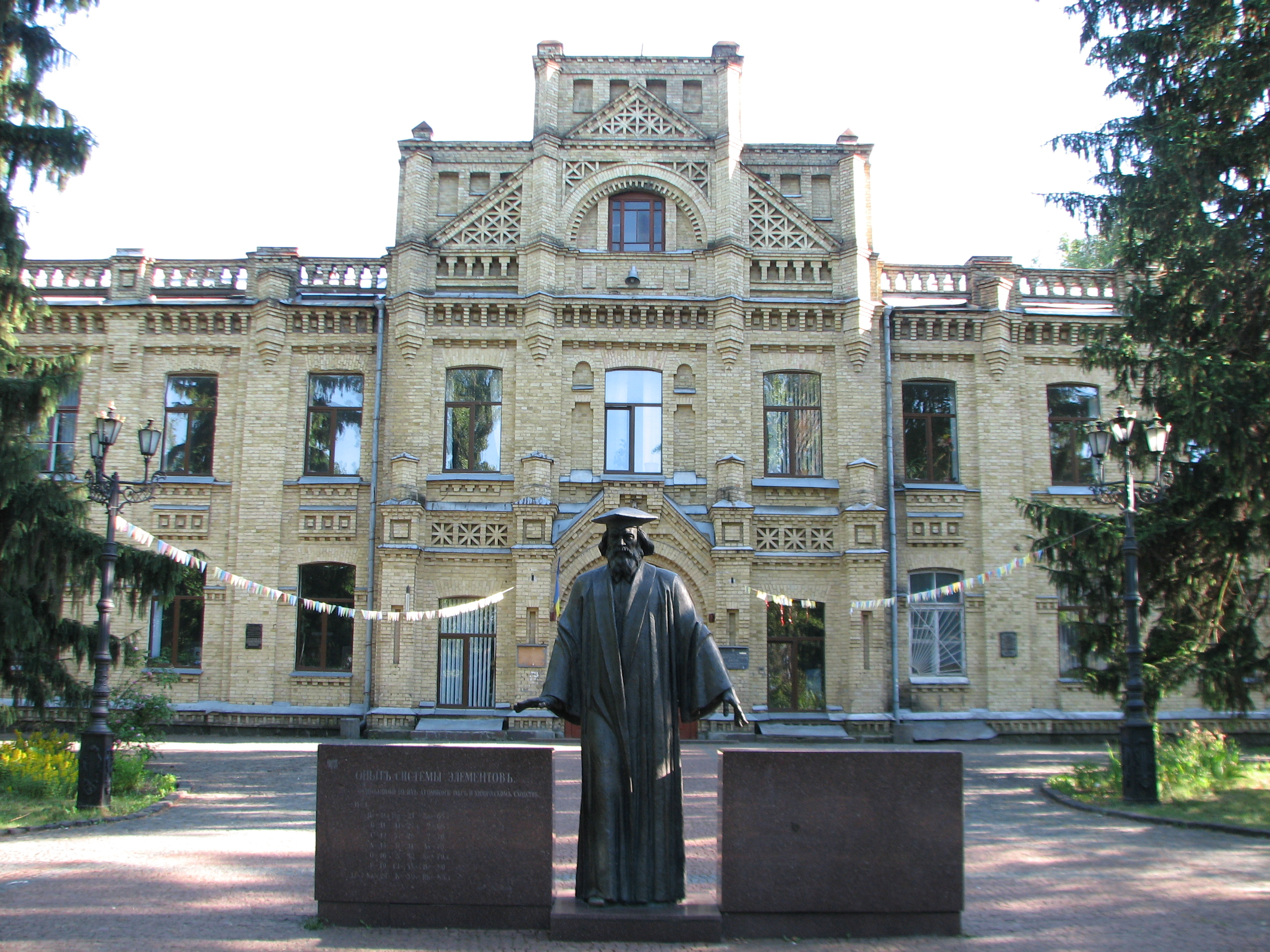 Второй корпус НТУУ "КПИ"